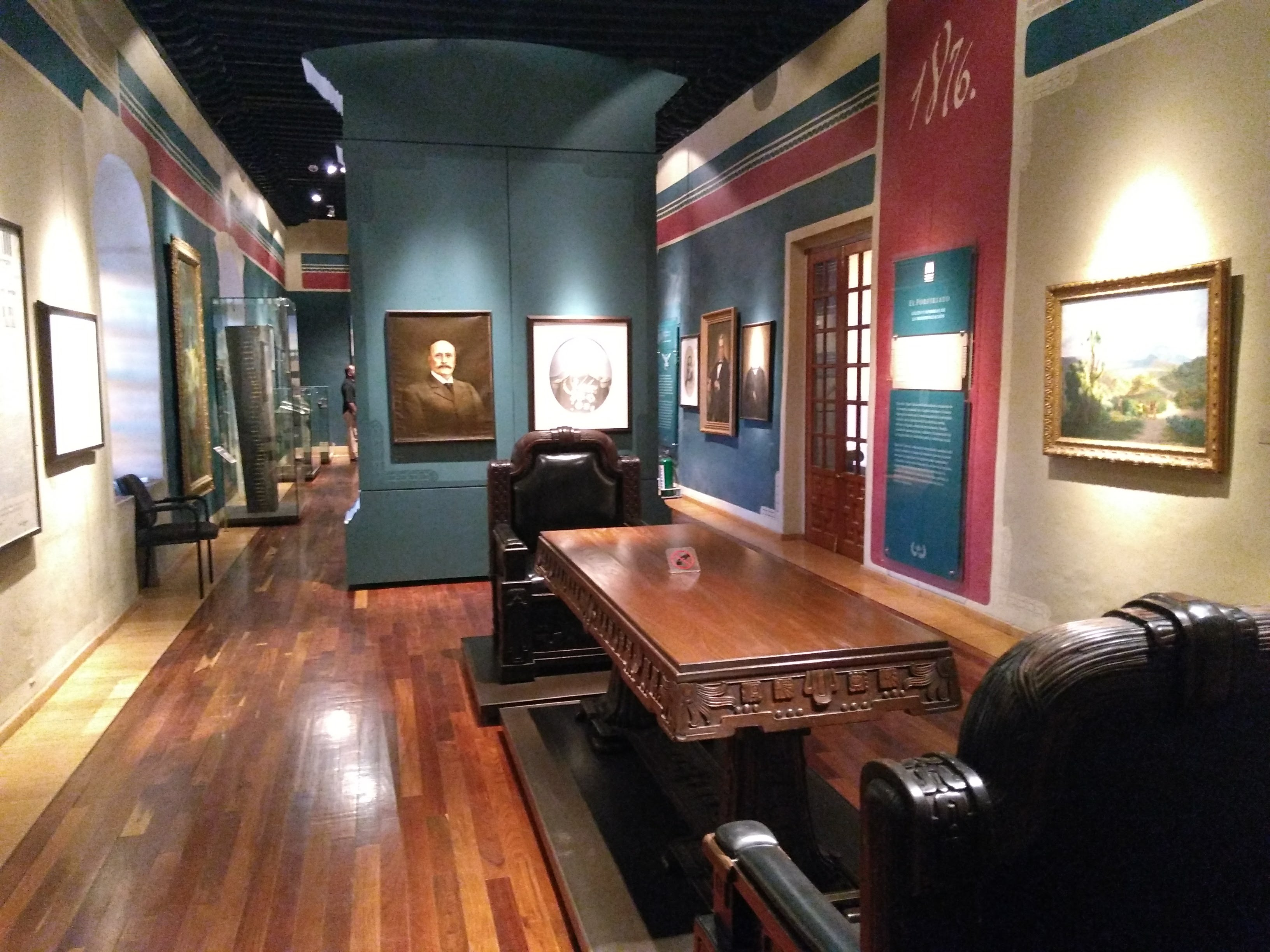 sala de exhibición en Templo y exconvento de San Agustín de Querétaro